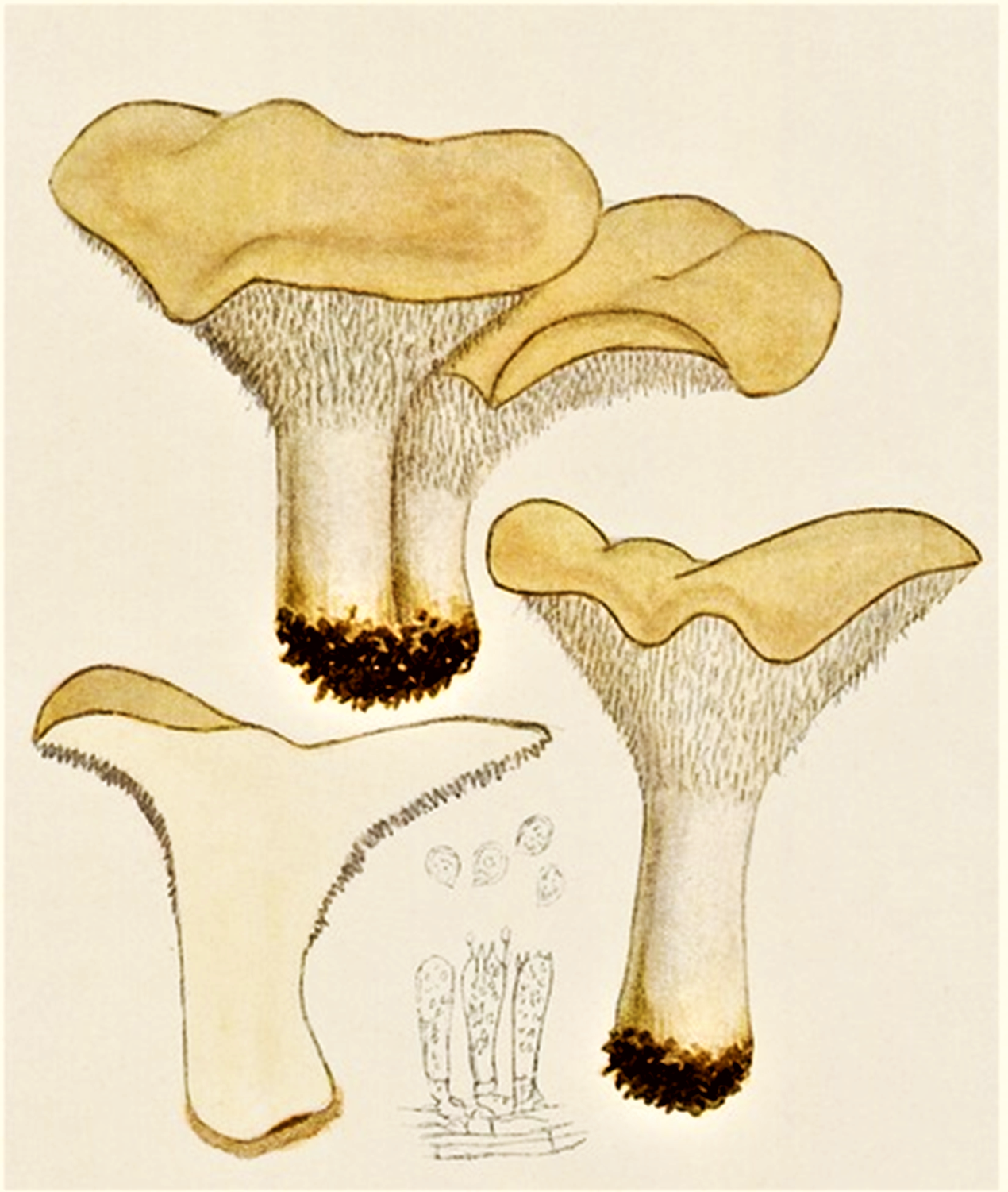 Giacomo Bresadola: Hydnum repandum L., 1753